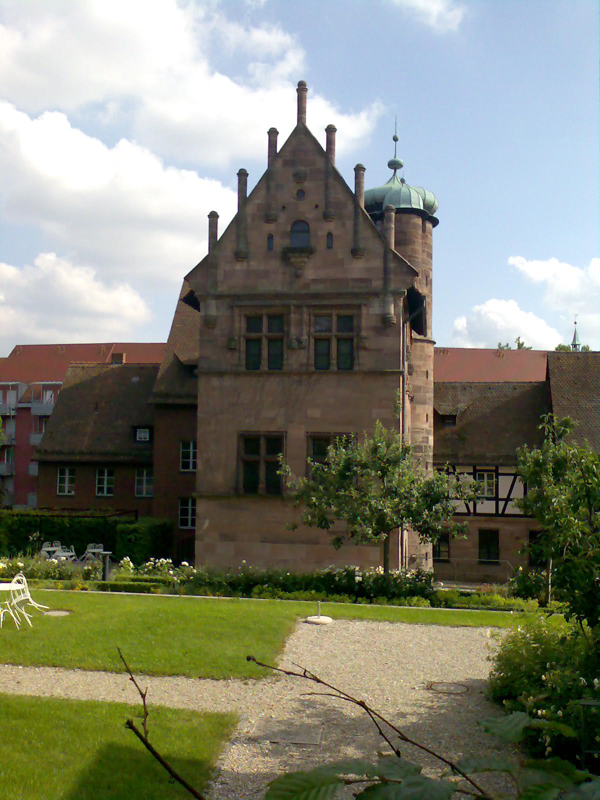 Tucherschloss in Nürnberg